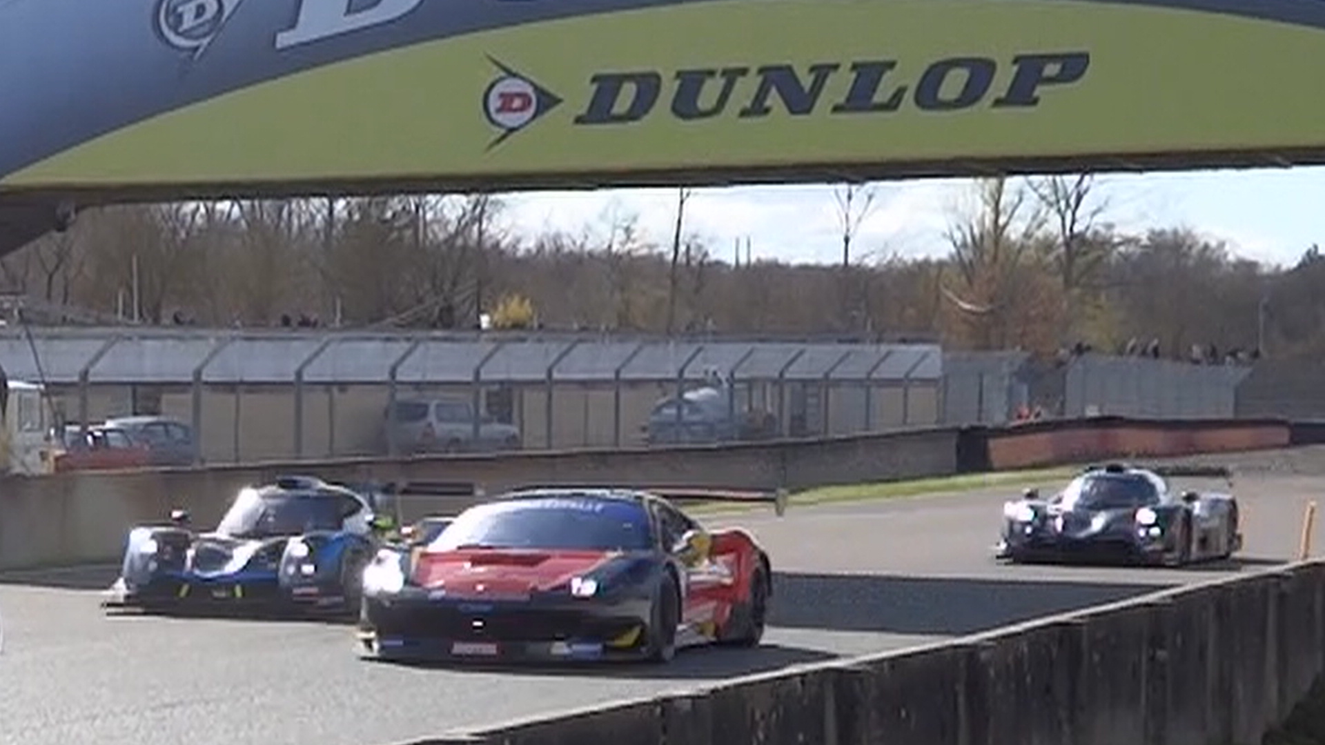 Deux Ligier et une Ferrari aux Coupes de Paques 2016, disputées dans le cadre du GT Tour.